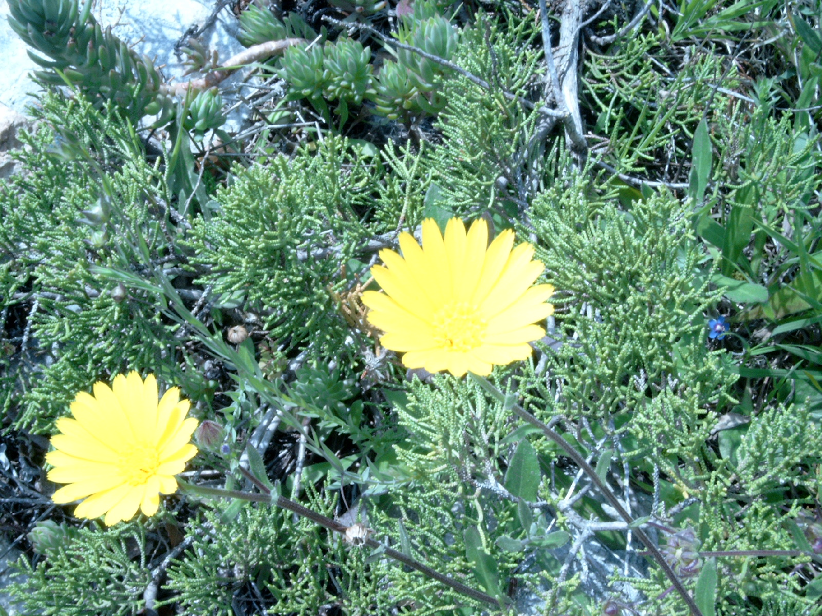 Species Calendula suffruticosa Familia Asteraceae